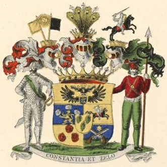 Pahleni suguvõsa krahvivapp